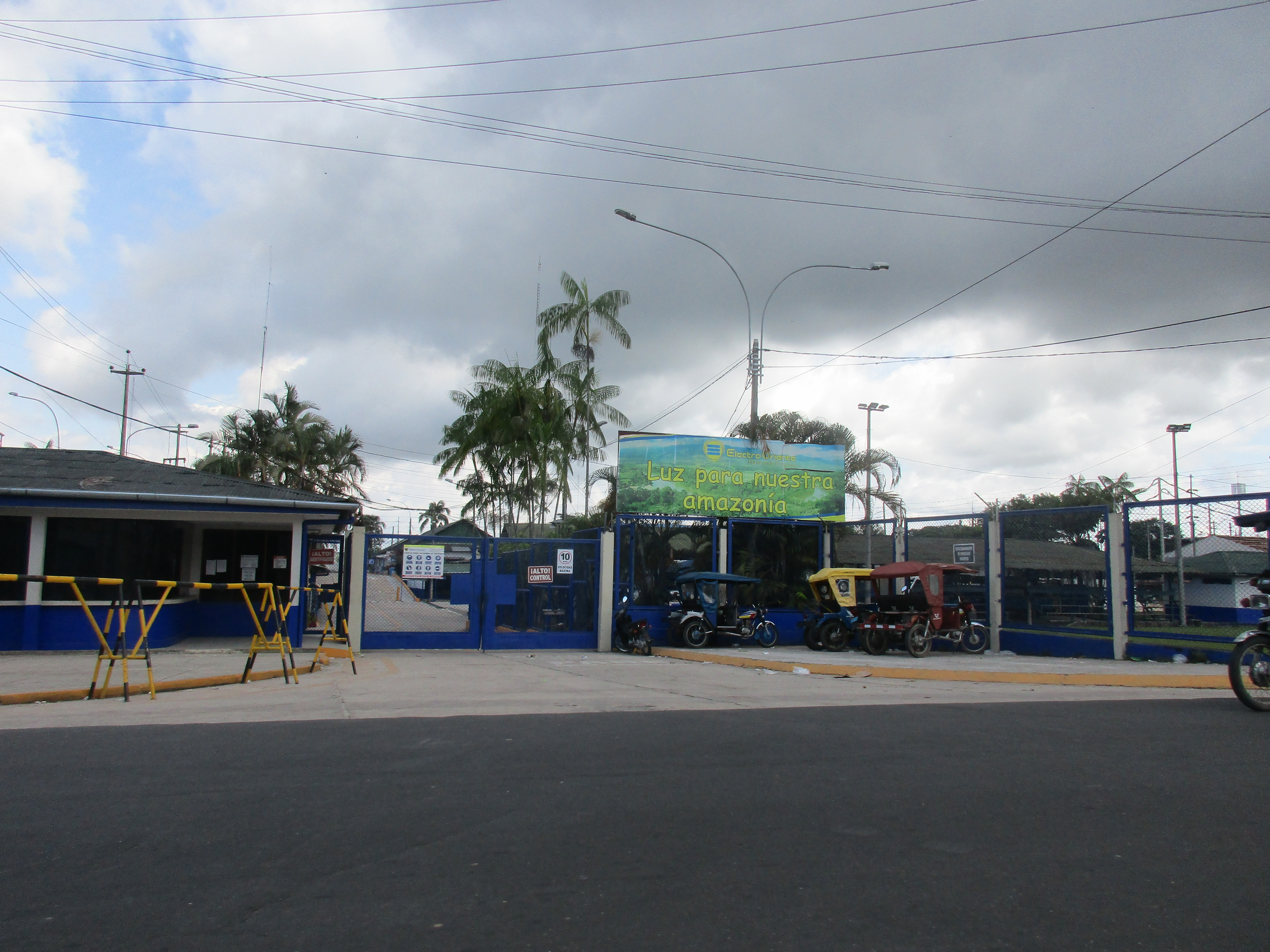 Empresa de Electro Oriente en la ciudad peruana de Iquitos.